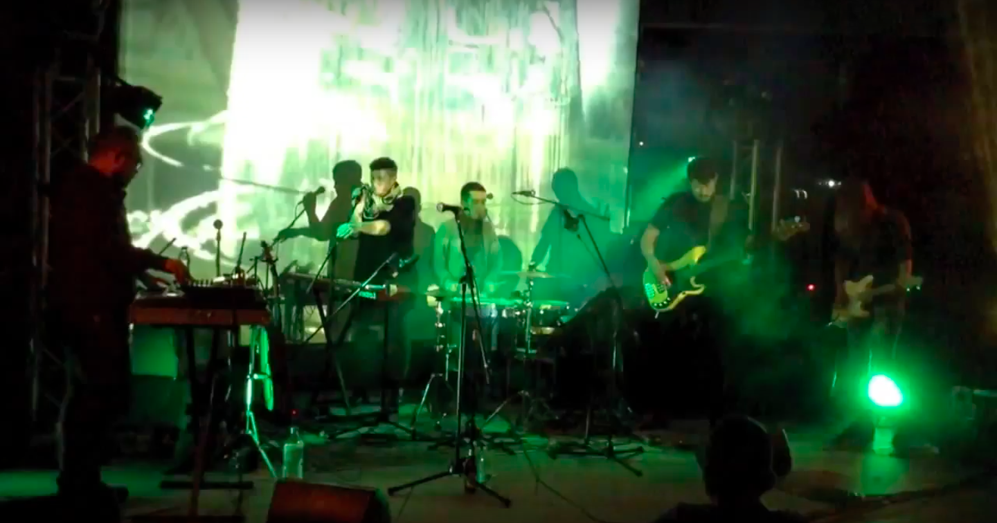 Anímic a #4Raons, el 2013.